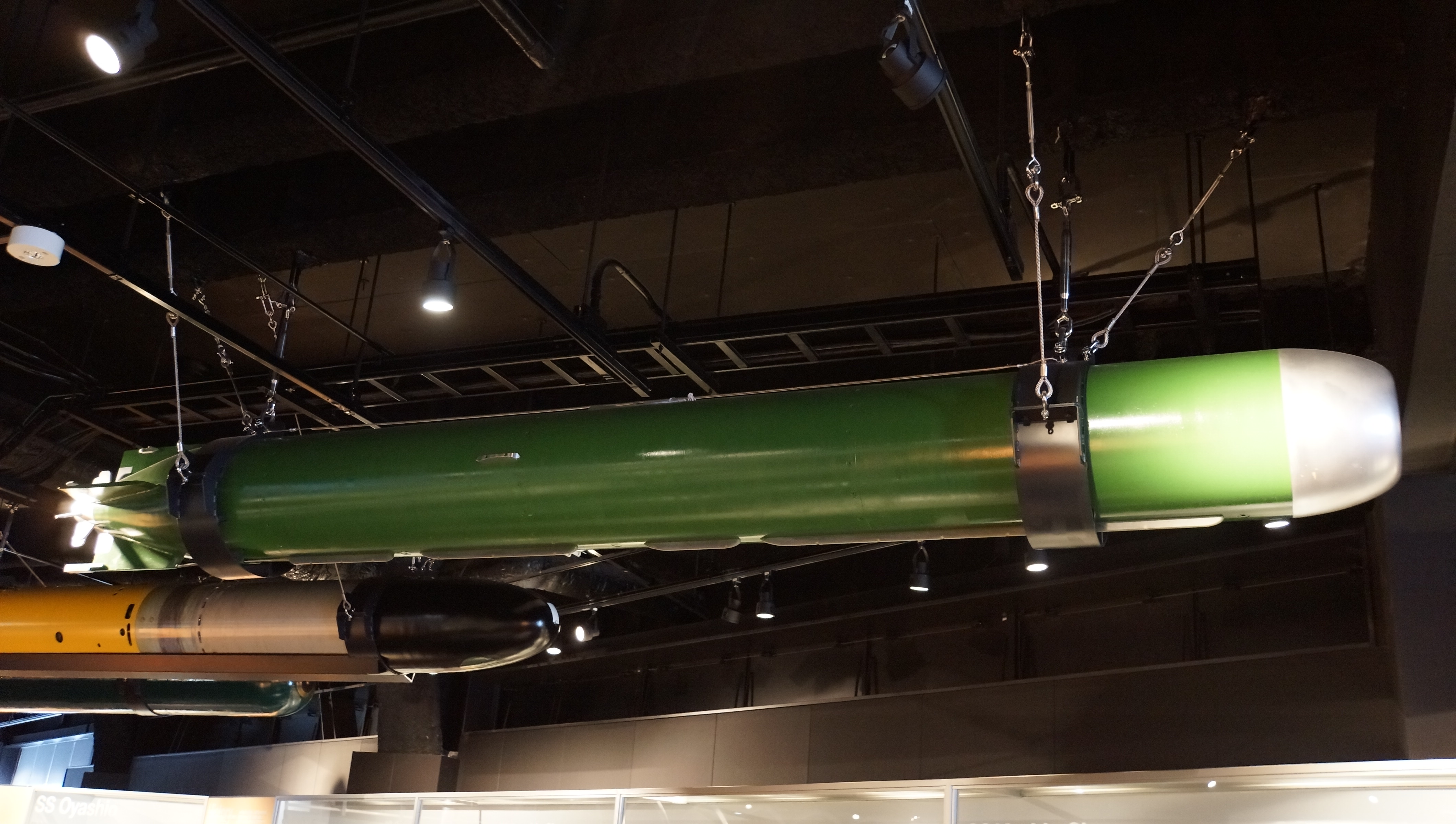 海上自衛隊 80式魚雷。 14年9月15日 海上自衛隊呉史料館内にて。